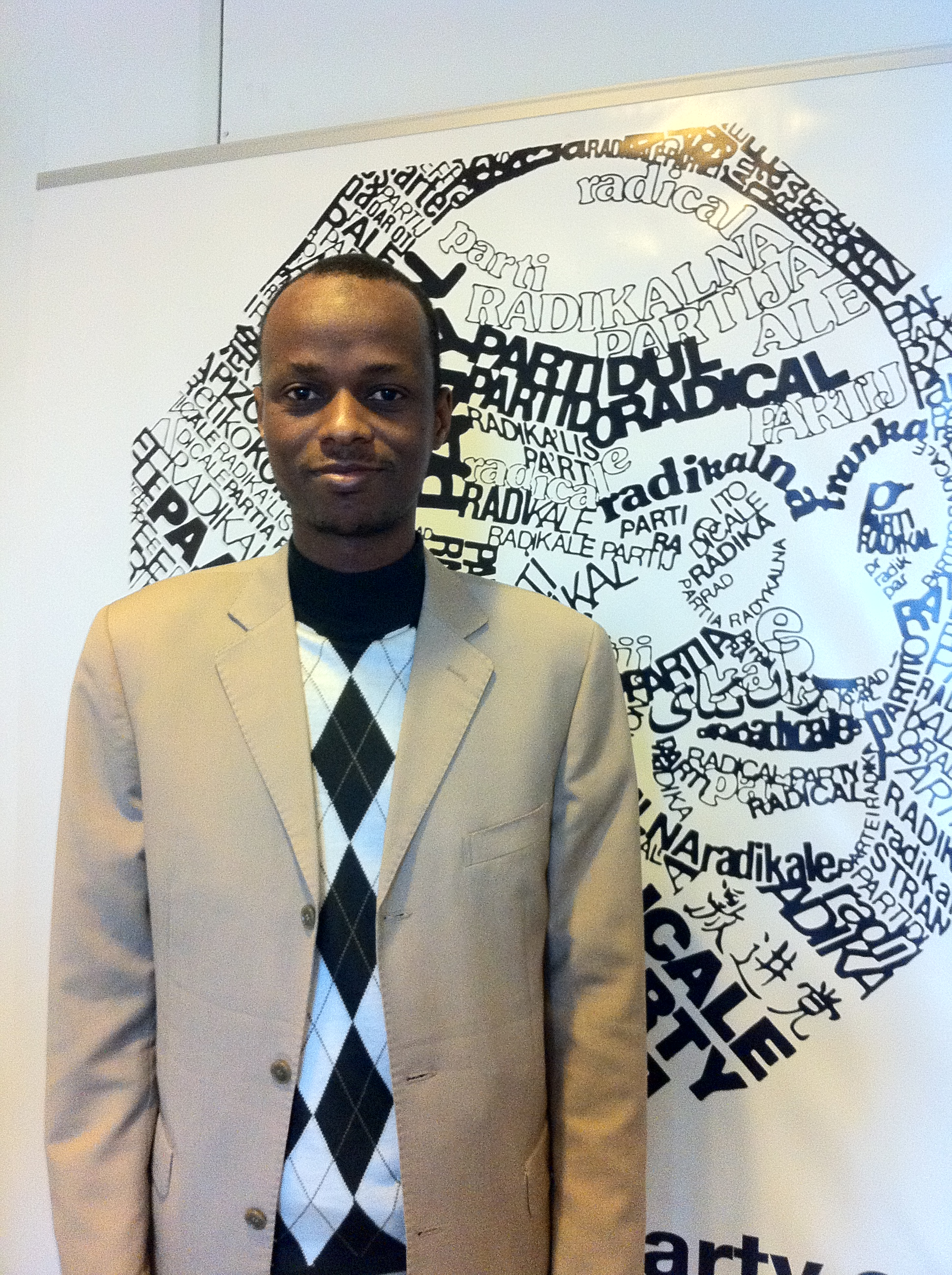 Demba Traoré dans le bureau de Rome du Parti Radical.